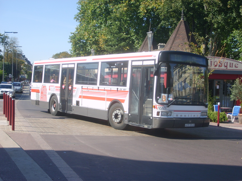 Ligne 8 (TUB) en direction de Délie (Beauvais).